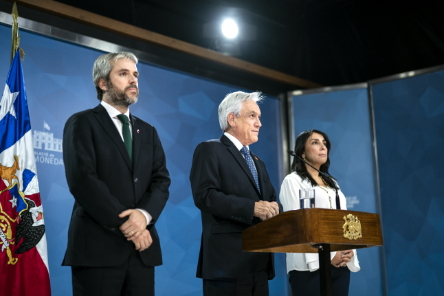 Presidente de Chile Sebastián Piñera, realiza un discurso donde llama al mundo politico a realizar acuerdos por la paz, por la justicia y para la nueva constitución, durante la noche del 12 de noviembre de 2019.